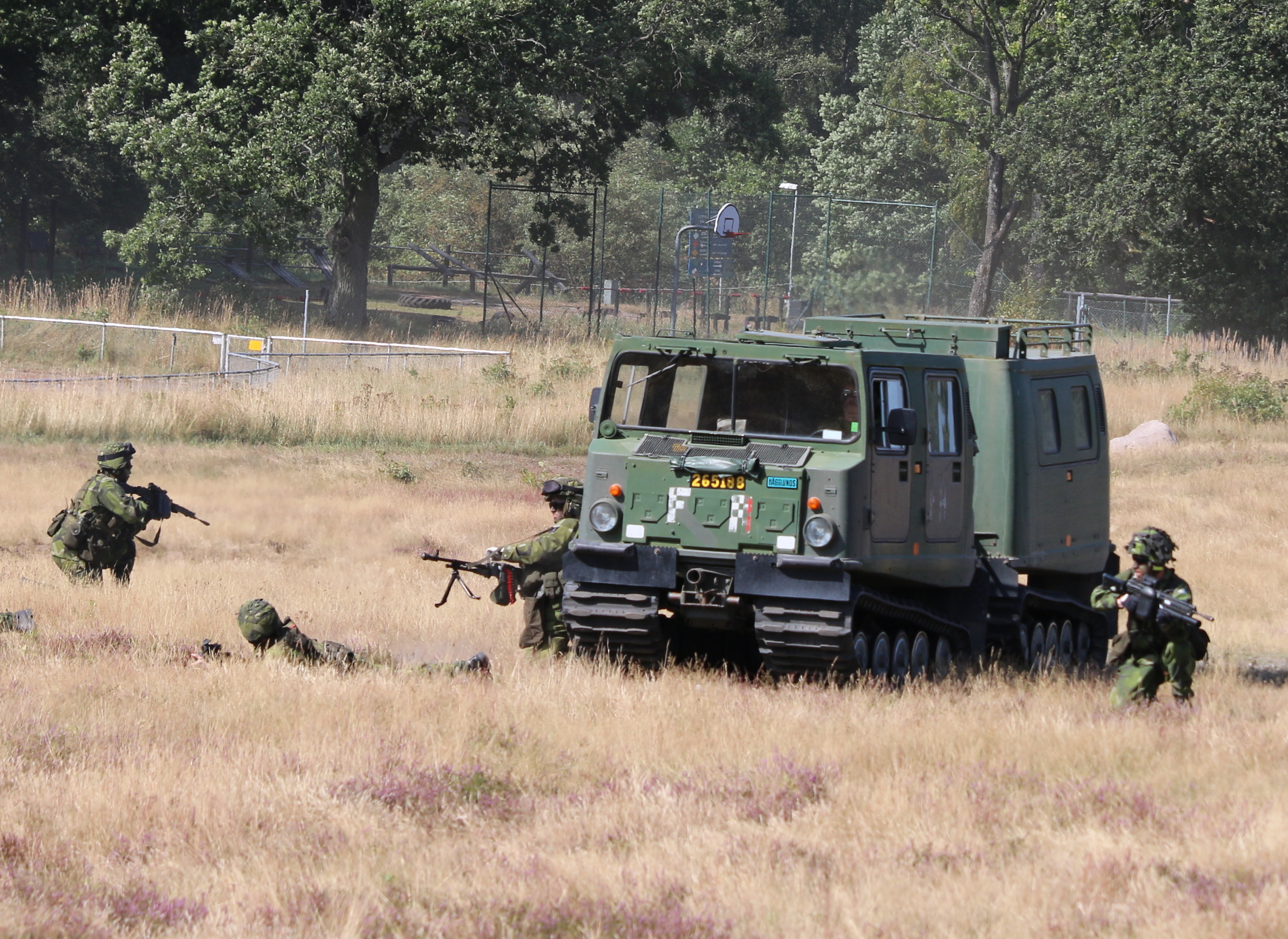 Bandvagn 206 Revinge 2015